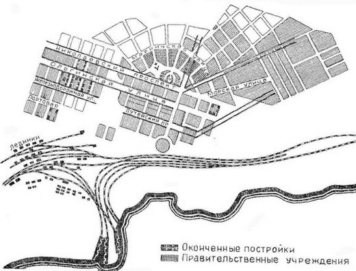 План застройки Мурманска (1916 год)